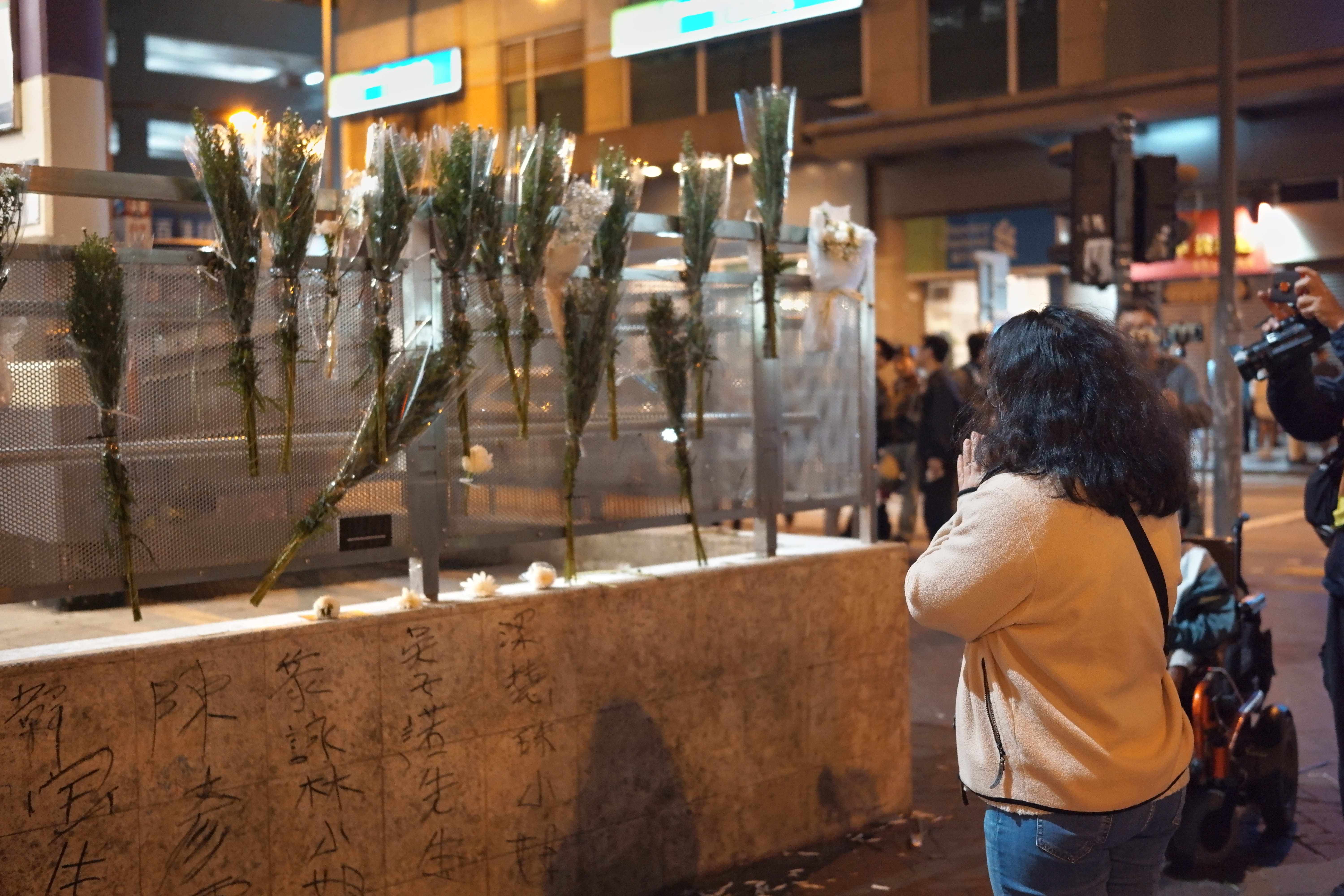 SDIM0206